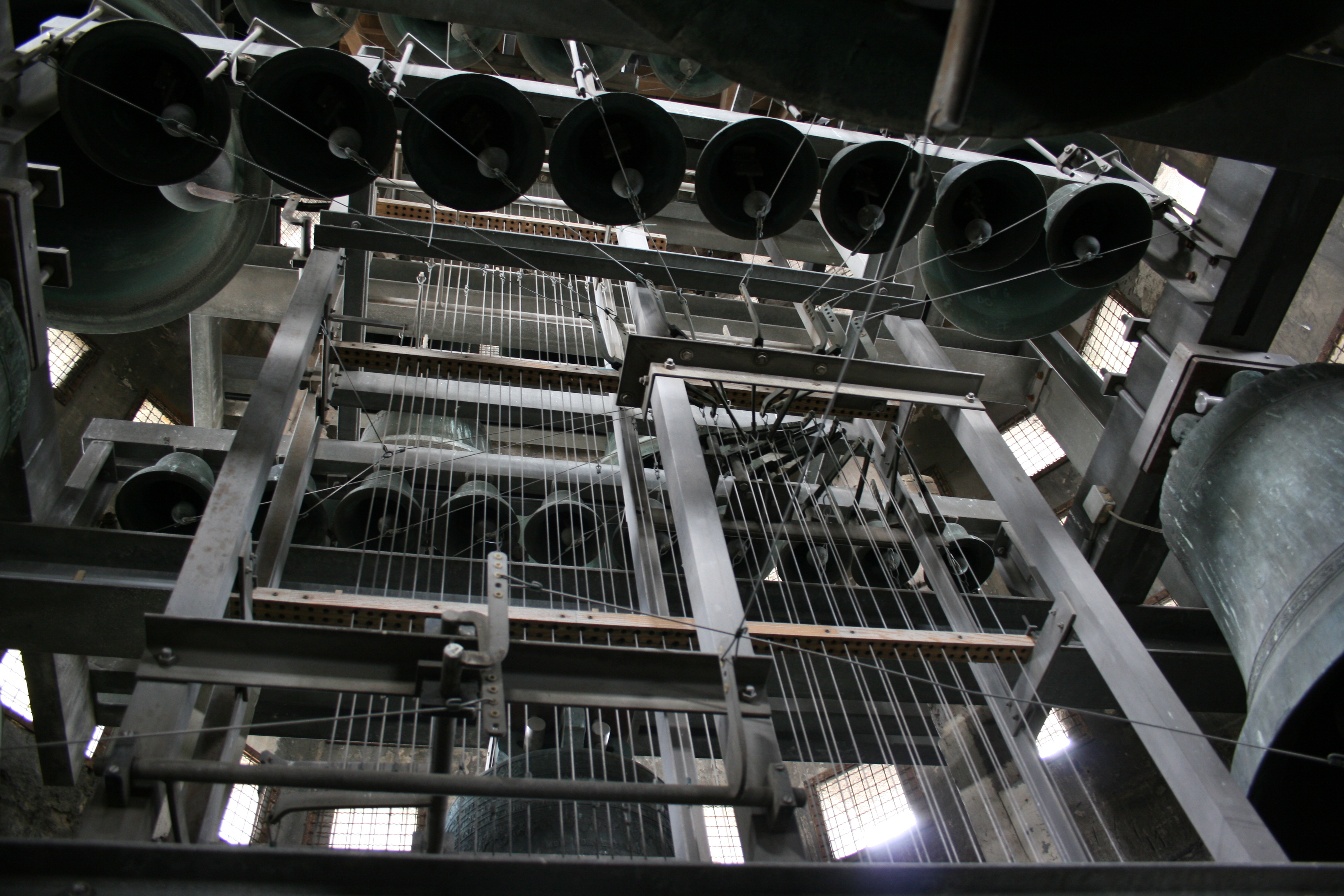 Le carillon de la tour abbatiale de Saint-Amand-les-Eaux (Nord)